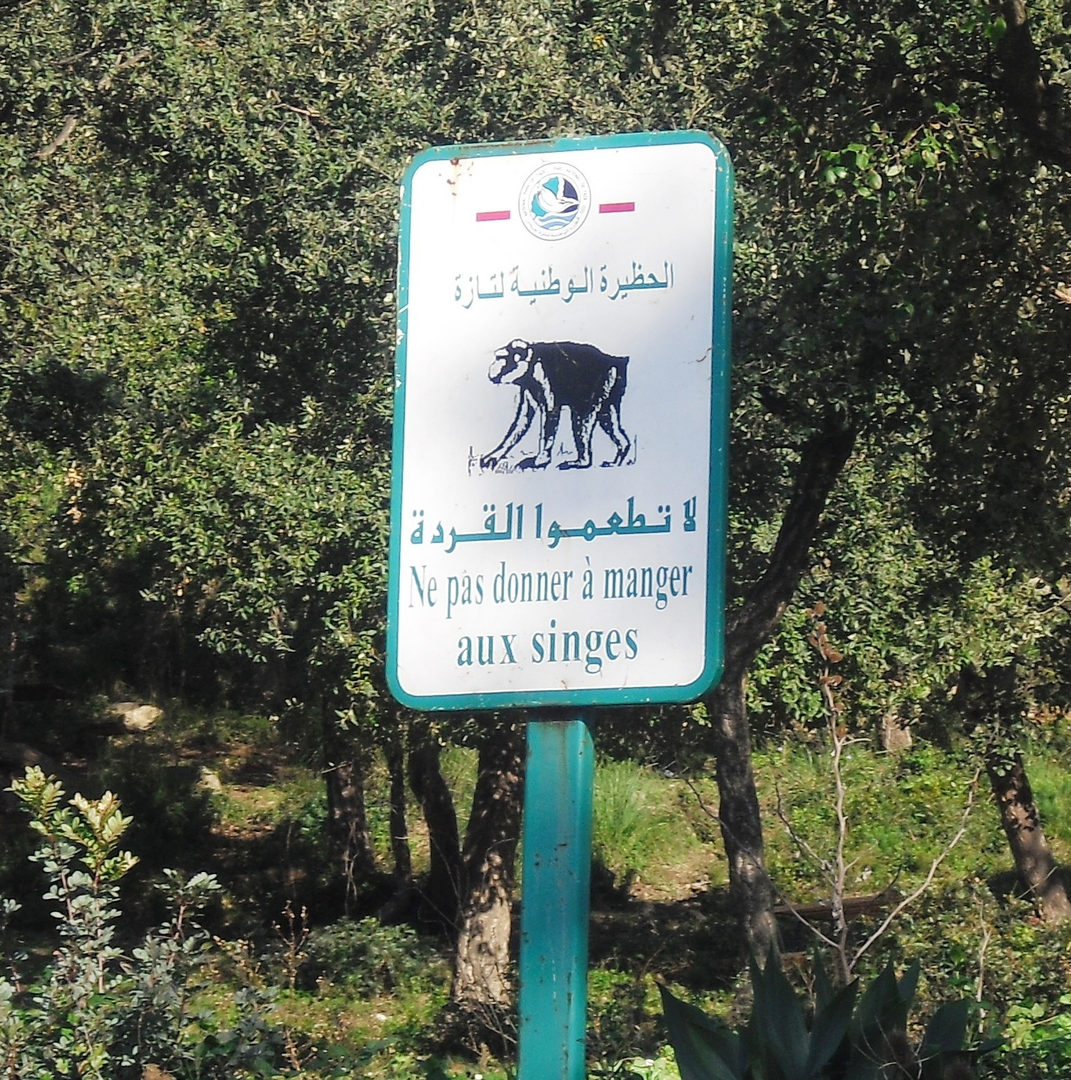 Ne pas donner à manger aux singe : panneau pour la protection du Macaque berbère à Ziama Mansouriah (Algérie)